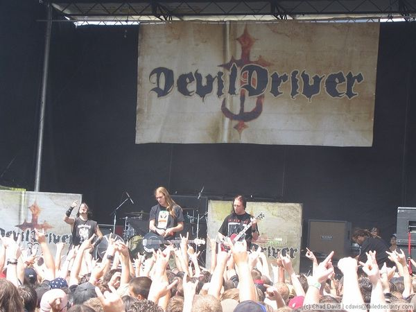 Devildriver band